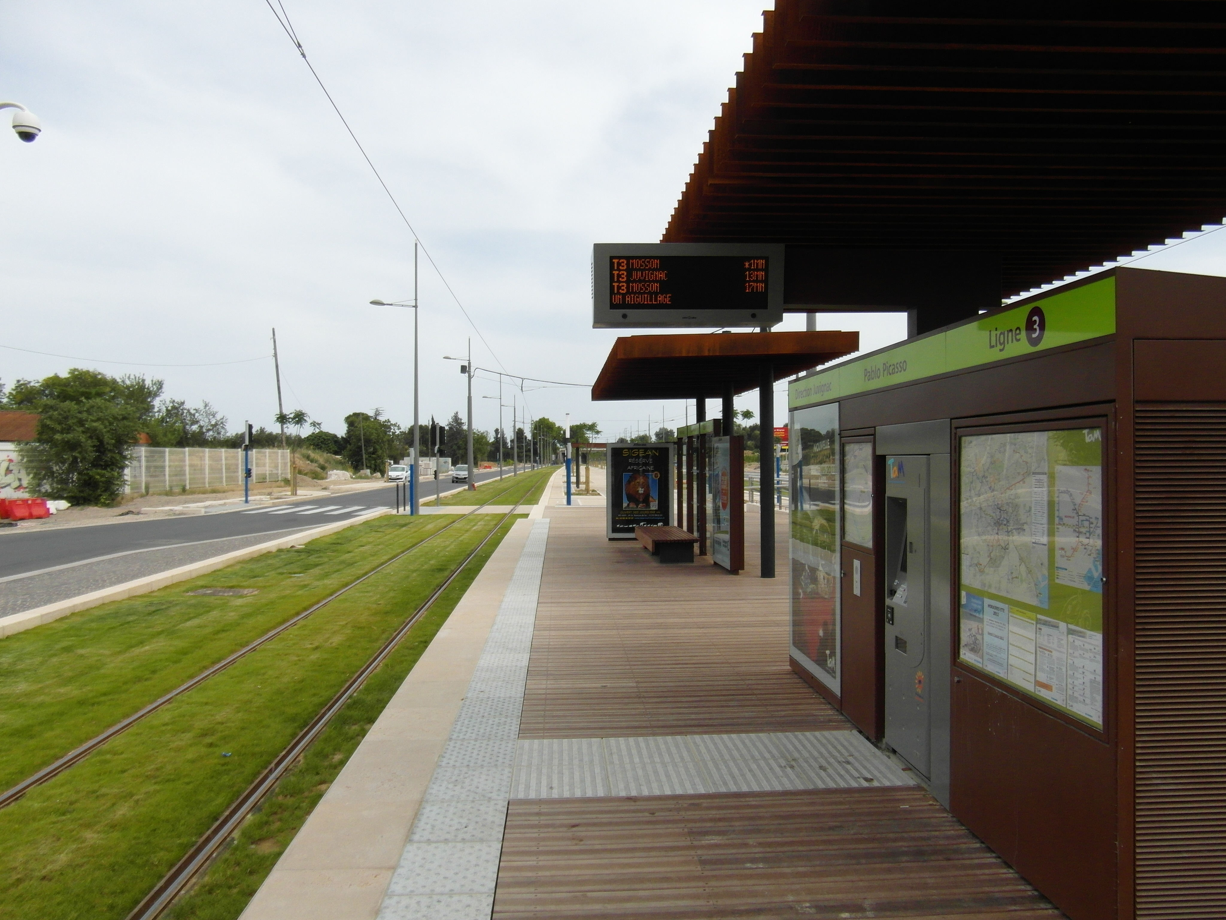 Montpellier - Tramway - Ligne 3 - Centre-Ville - Lattes